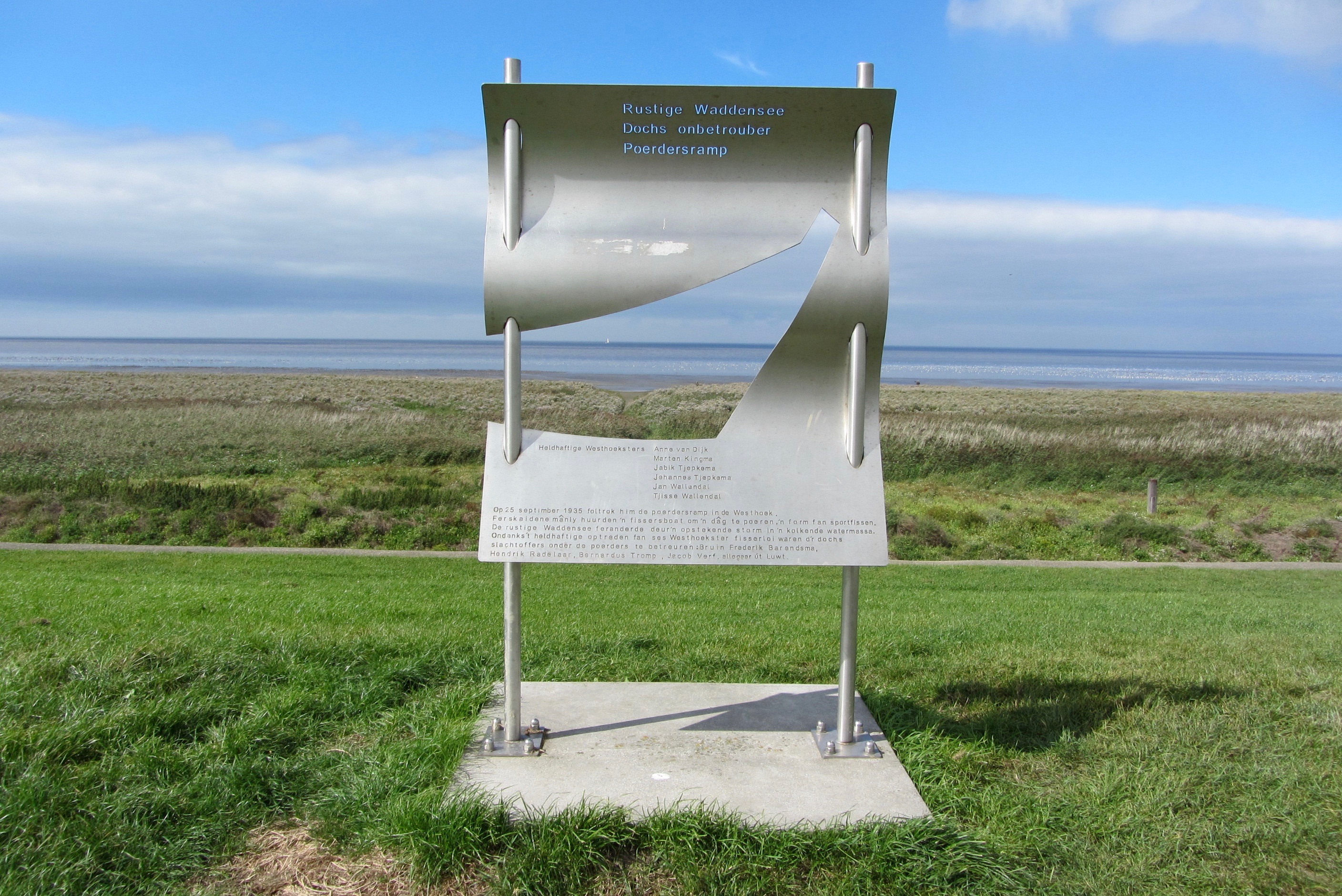 Marco Goldenbeld, 2010